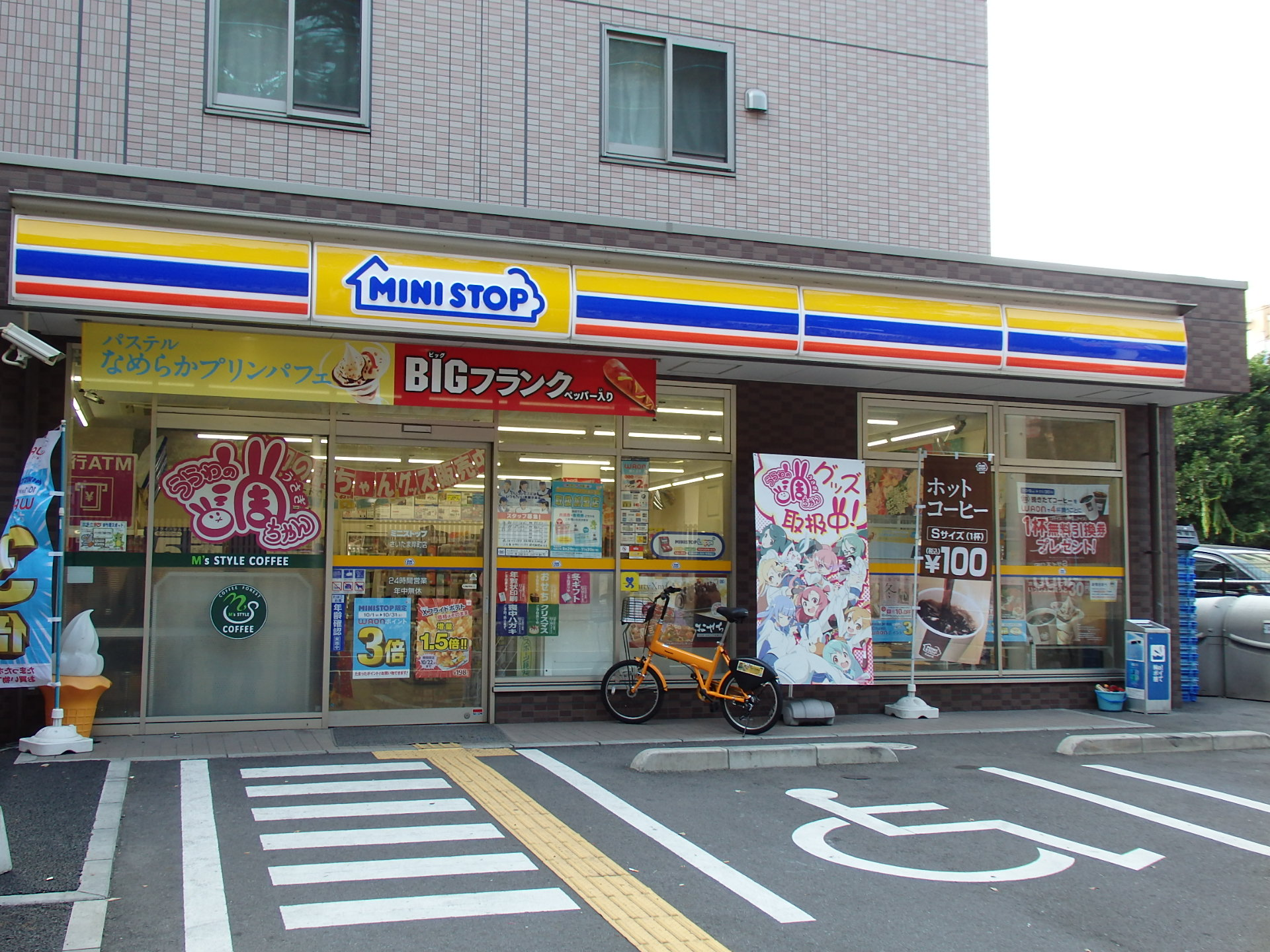 浦和の調ちゃんコンビニ